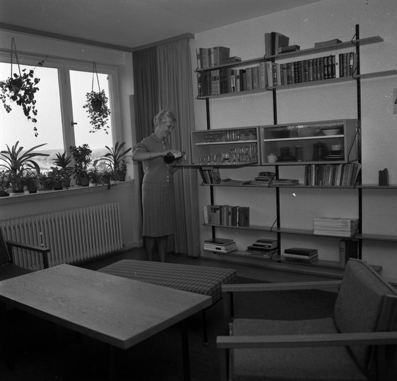 Wohnungsbau: Sprendlingen/Hessen 17. - 20. Juli 1961